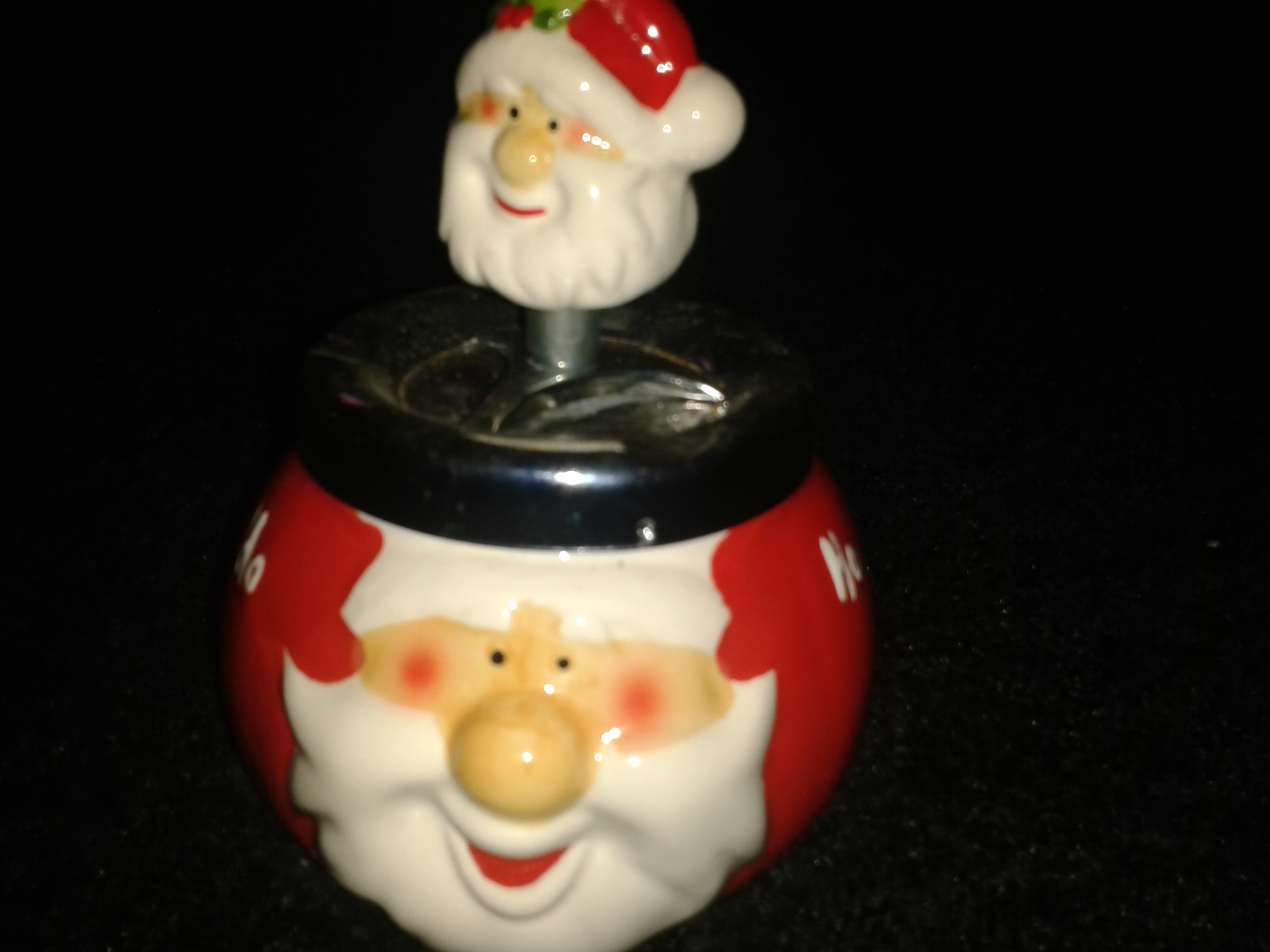 Esta imagen corresponde a un cenicero tradicional decorado con motivos navideños